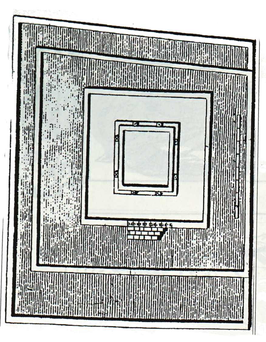 découvert lors de fouilles au Châtelet.